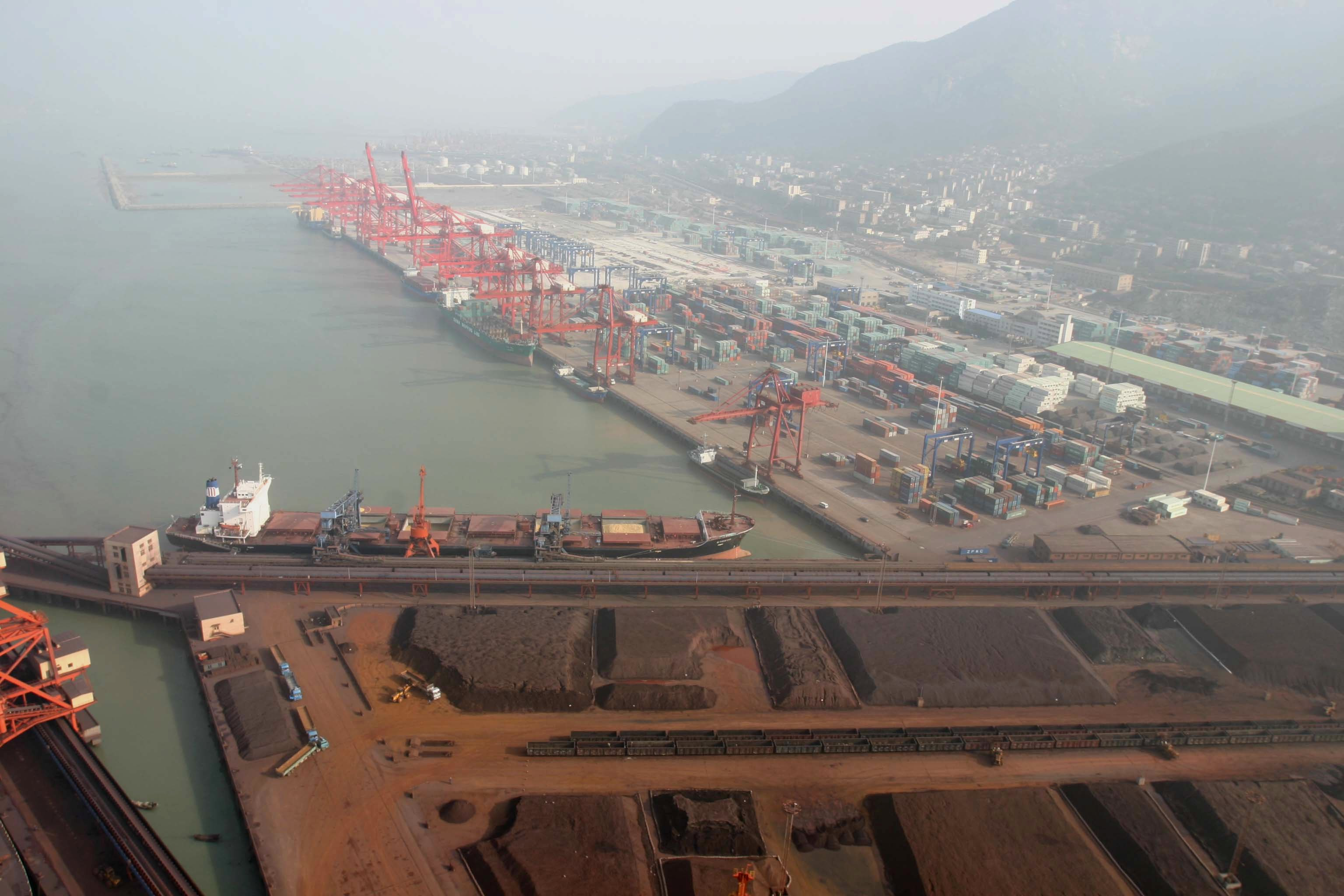 港口码头远眺照片